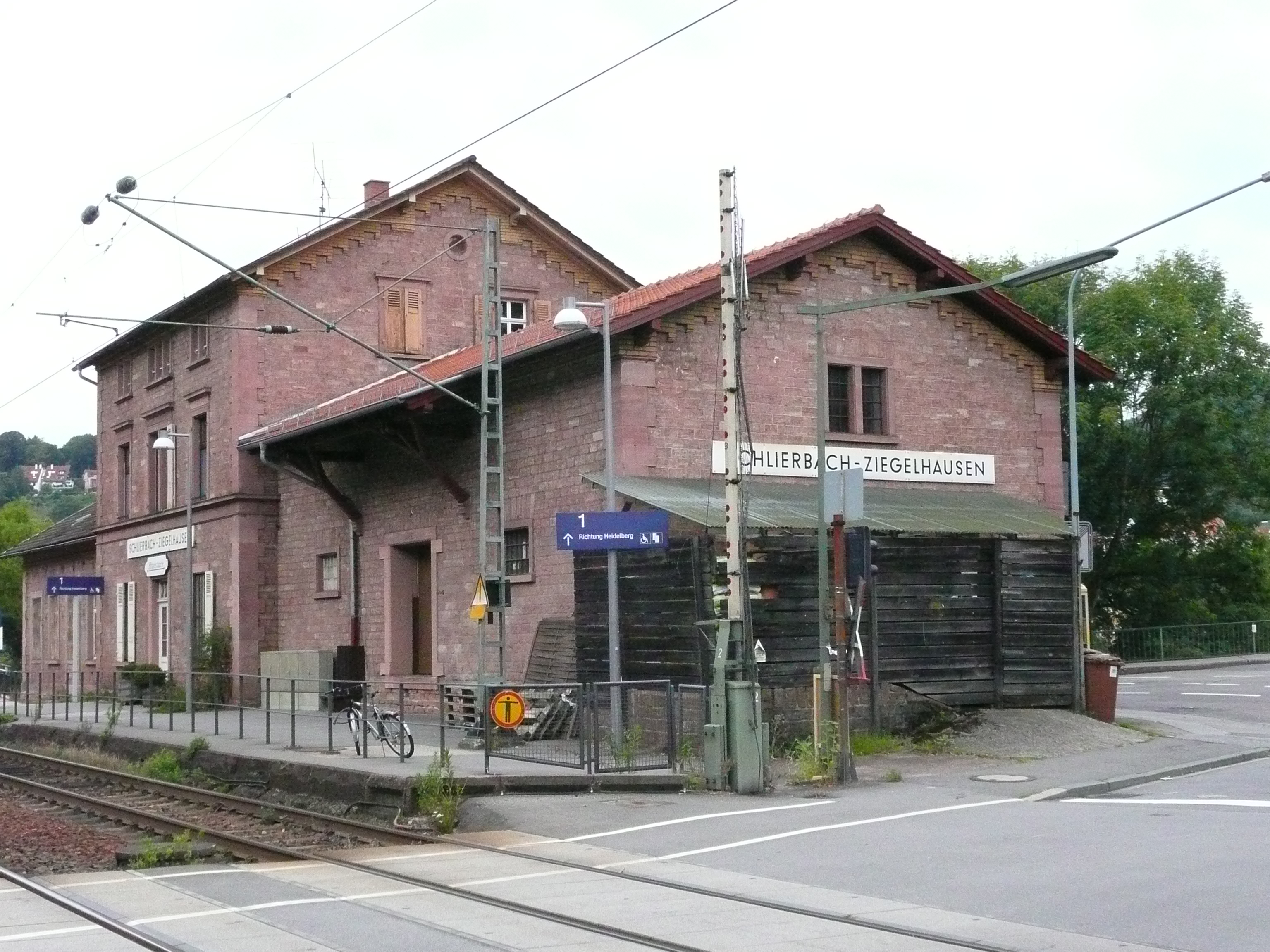 Bahnhof Schlierbach-Ziegelhausen in Heidelberg (Deutschland)